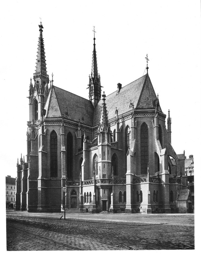 St. Othmar unter den Weißgärbern. Seitenansicht